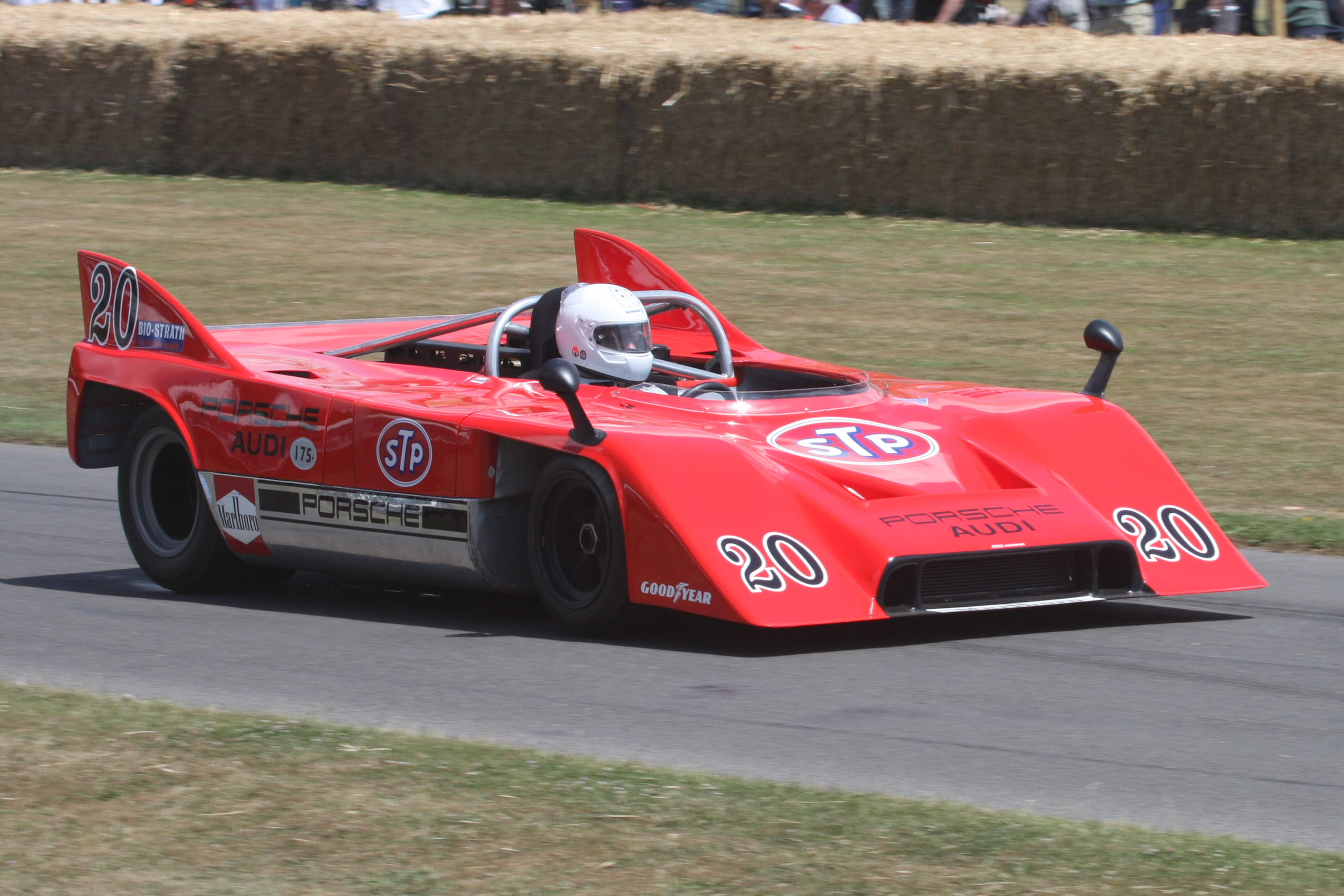 1971 Porsche 917/10 4.9 litre CanAm ex-Joseph Siffert